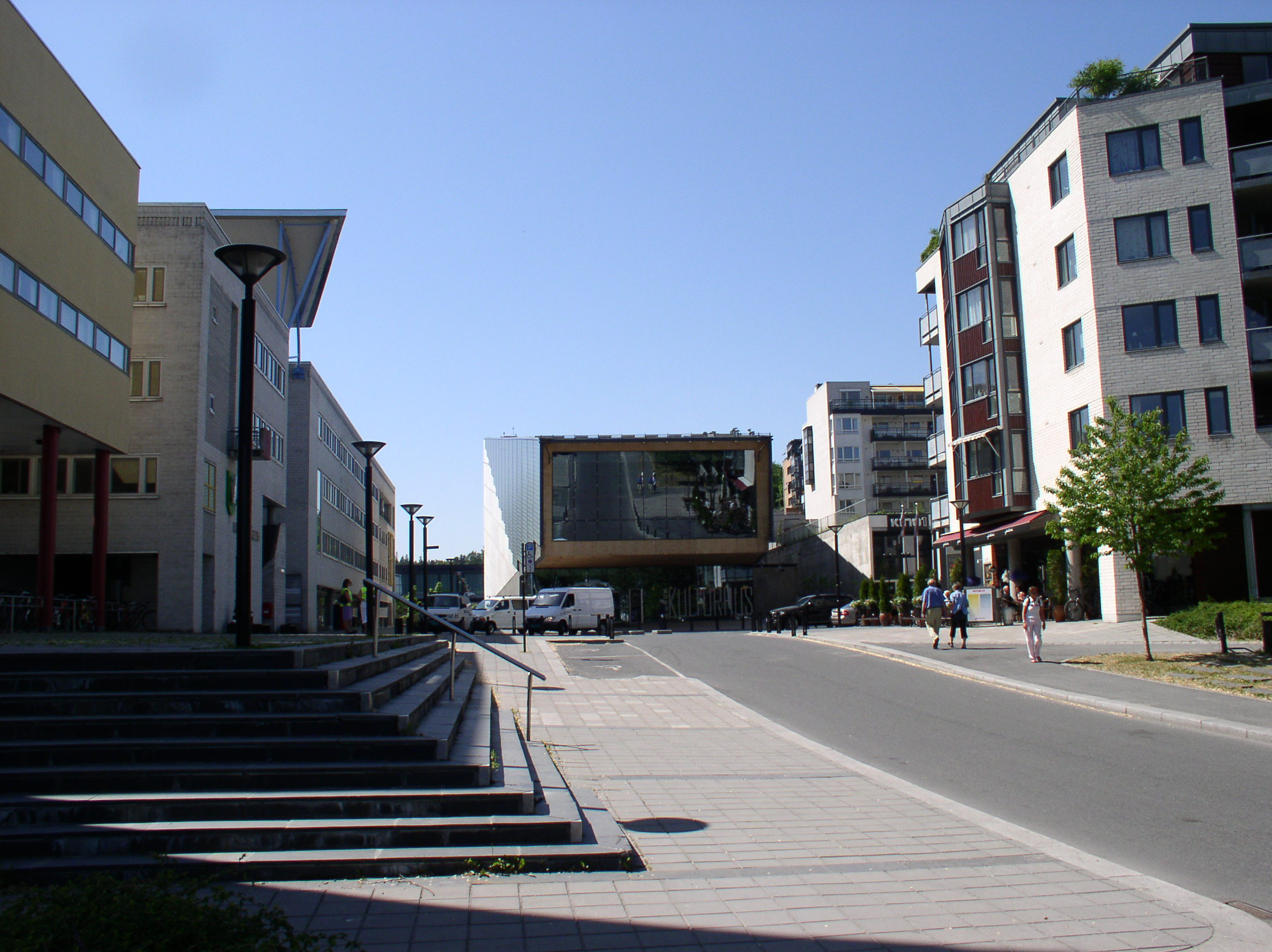 Kulturhuset i Bærum med Kommunegården på venstre hånd